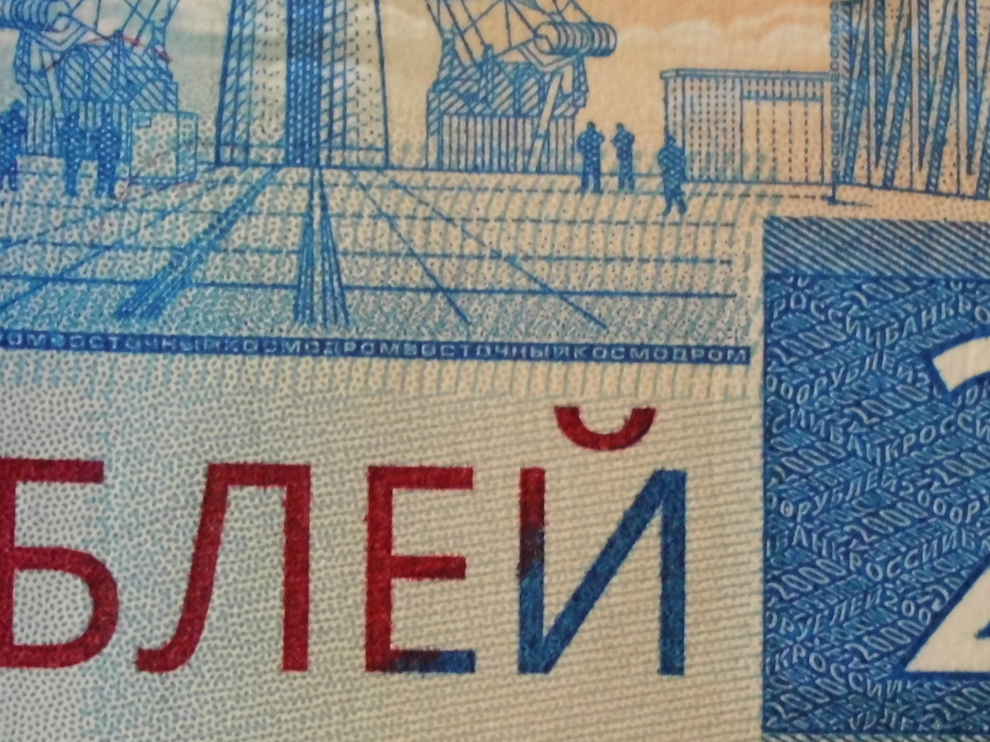 2000 российских рублей образца 2017 года. Реверс, посередине снизу. Микротекст (КОСМОДРОМВОСТОЧНЫЙ, БАНКРОССИИ, 2000РУБЛЕЙ)